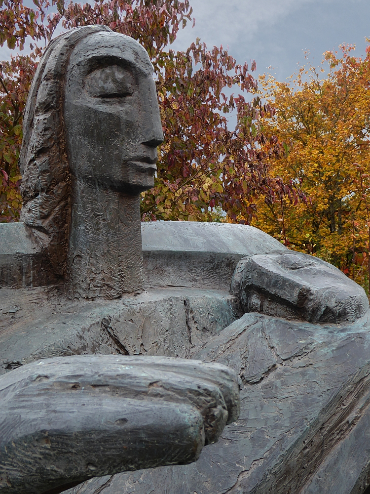 Raoul Ratnowsky (1912–199) Bildhauer, Skulptur (vom Meer) auf dem Friedhof von Dornach, Solothurn